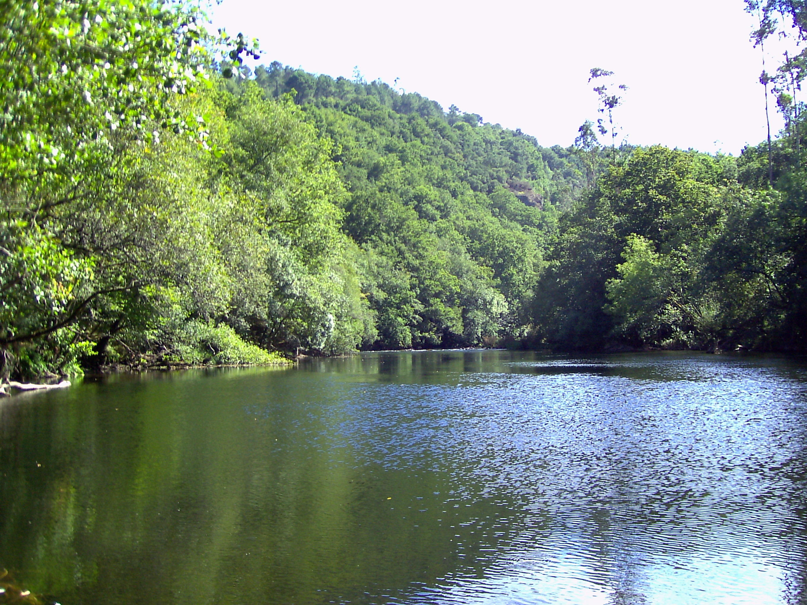 Río Ulla, Boqueixón.